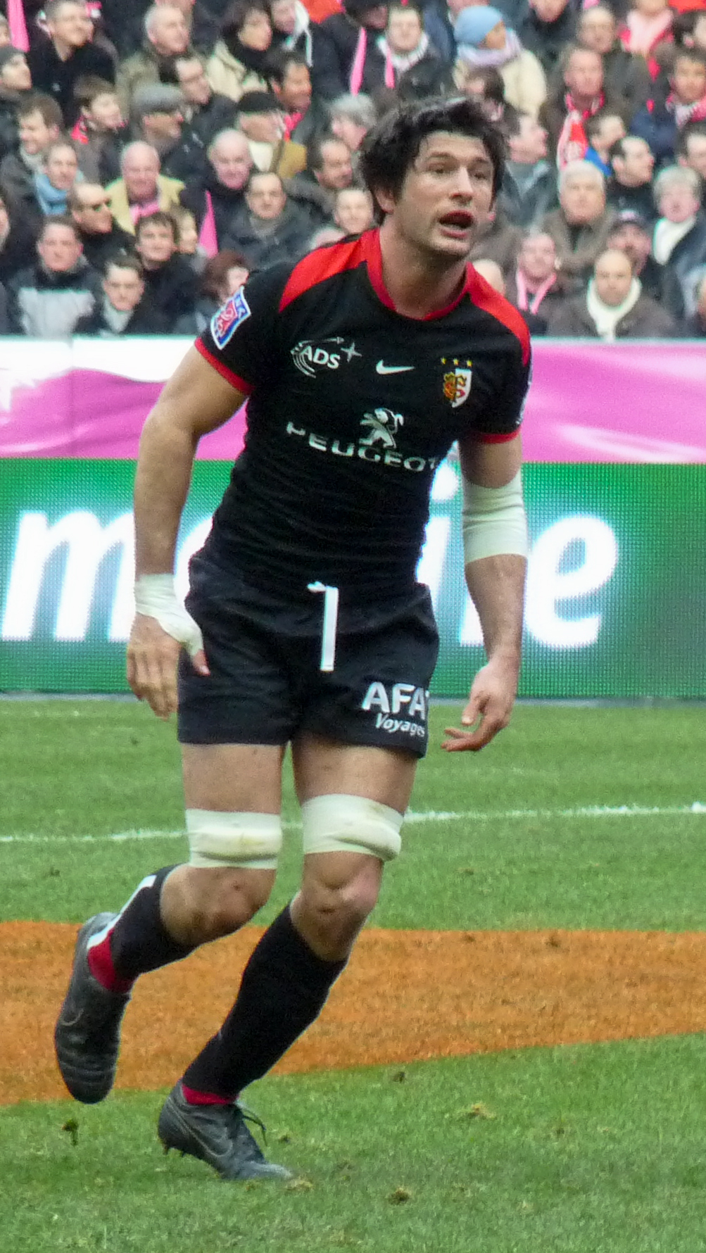 Match rugby Stade français vs Stade toulousain - 6 March 2010, Stade de France.